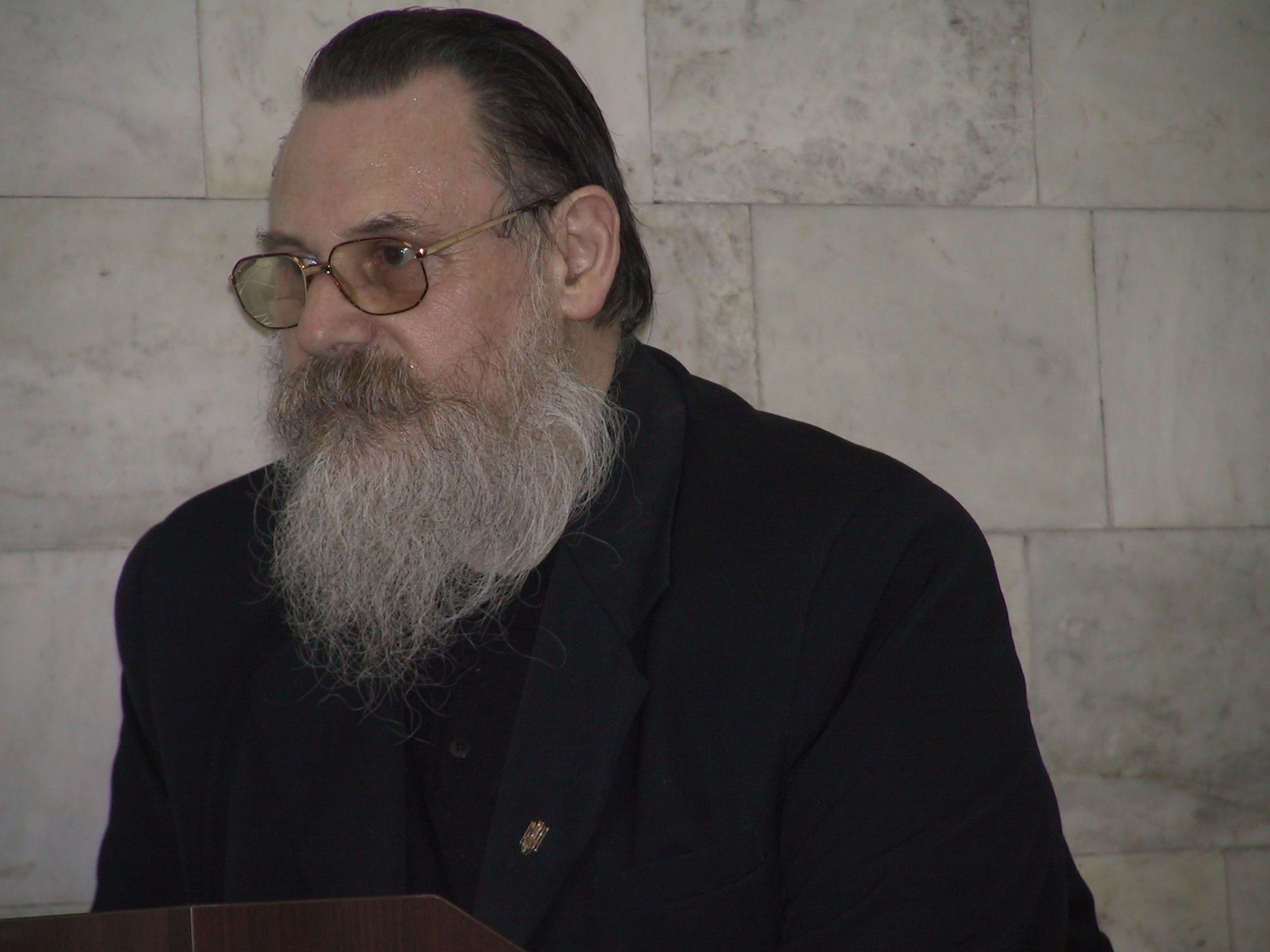 Отець Рафаїл Турконяк на зустрічі зі слухачами курсів англійської мови, студентами, викладачами і співробітниками Львівської політехніки 14.05.2013